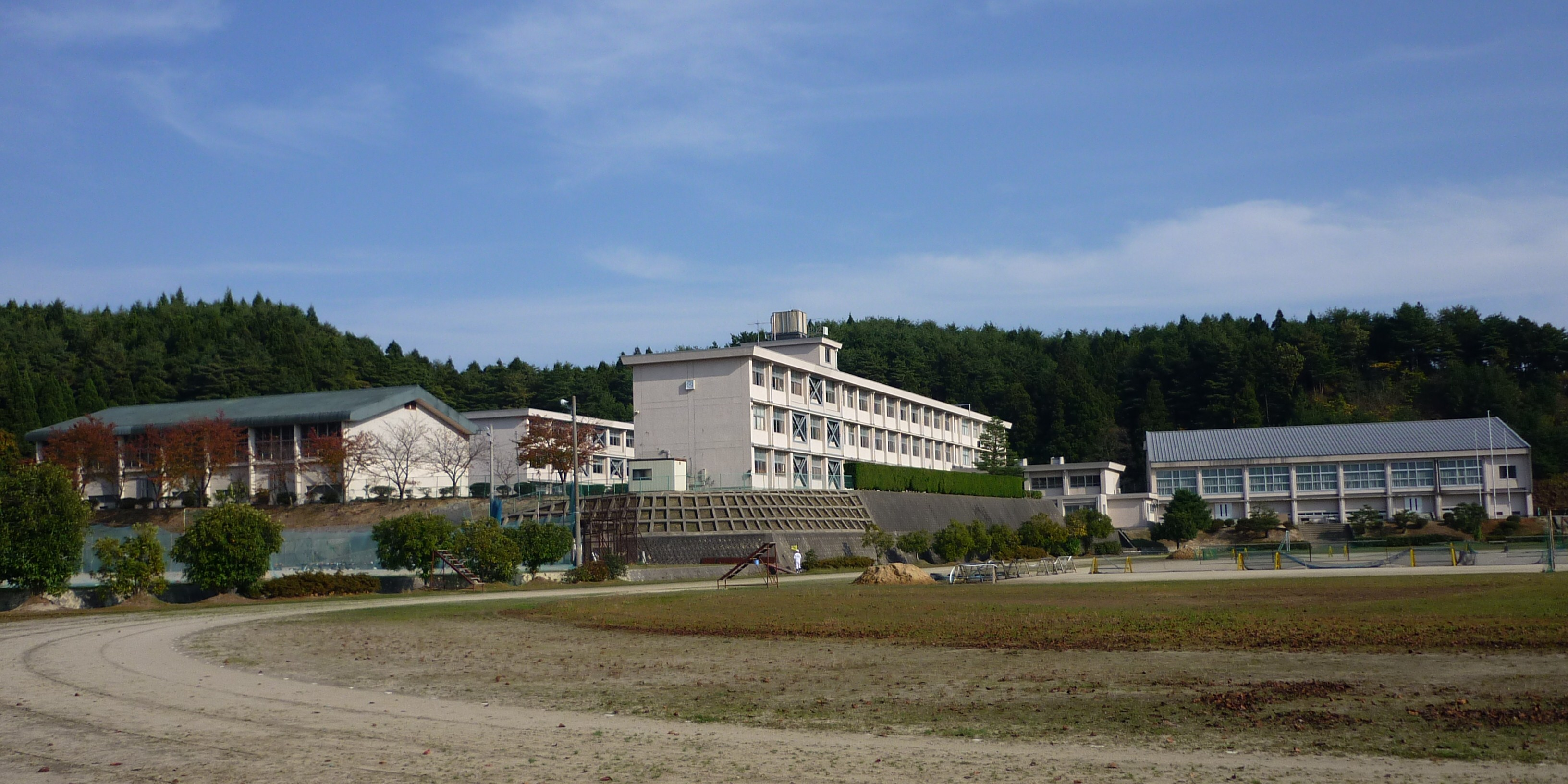 外から見た珠洲市立緑丘中学校の様子